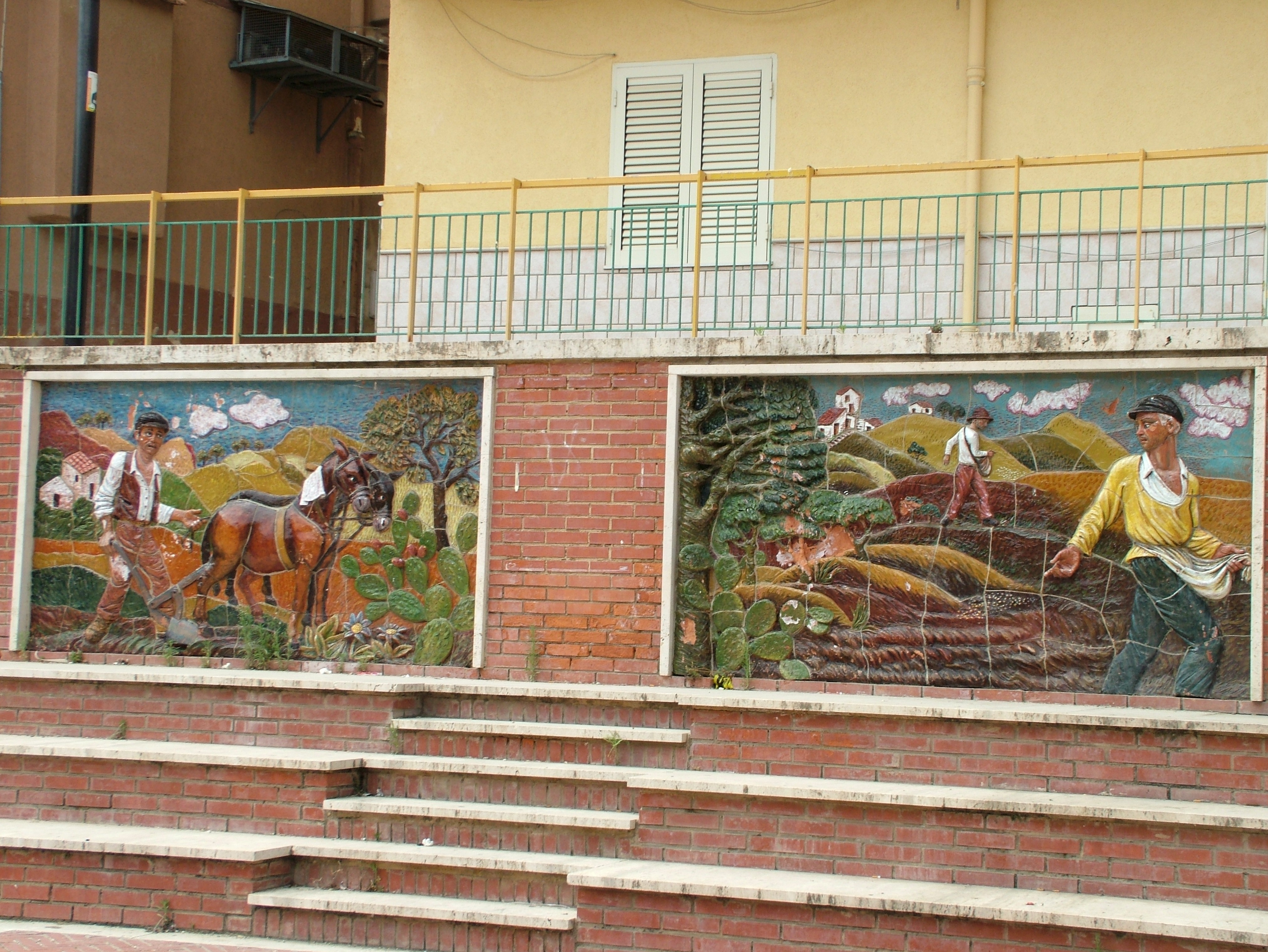 Santa Elisabetta, Fliessen Piazza San Carlo